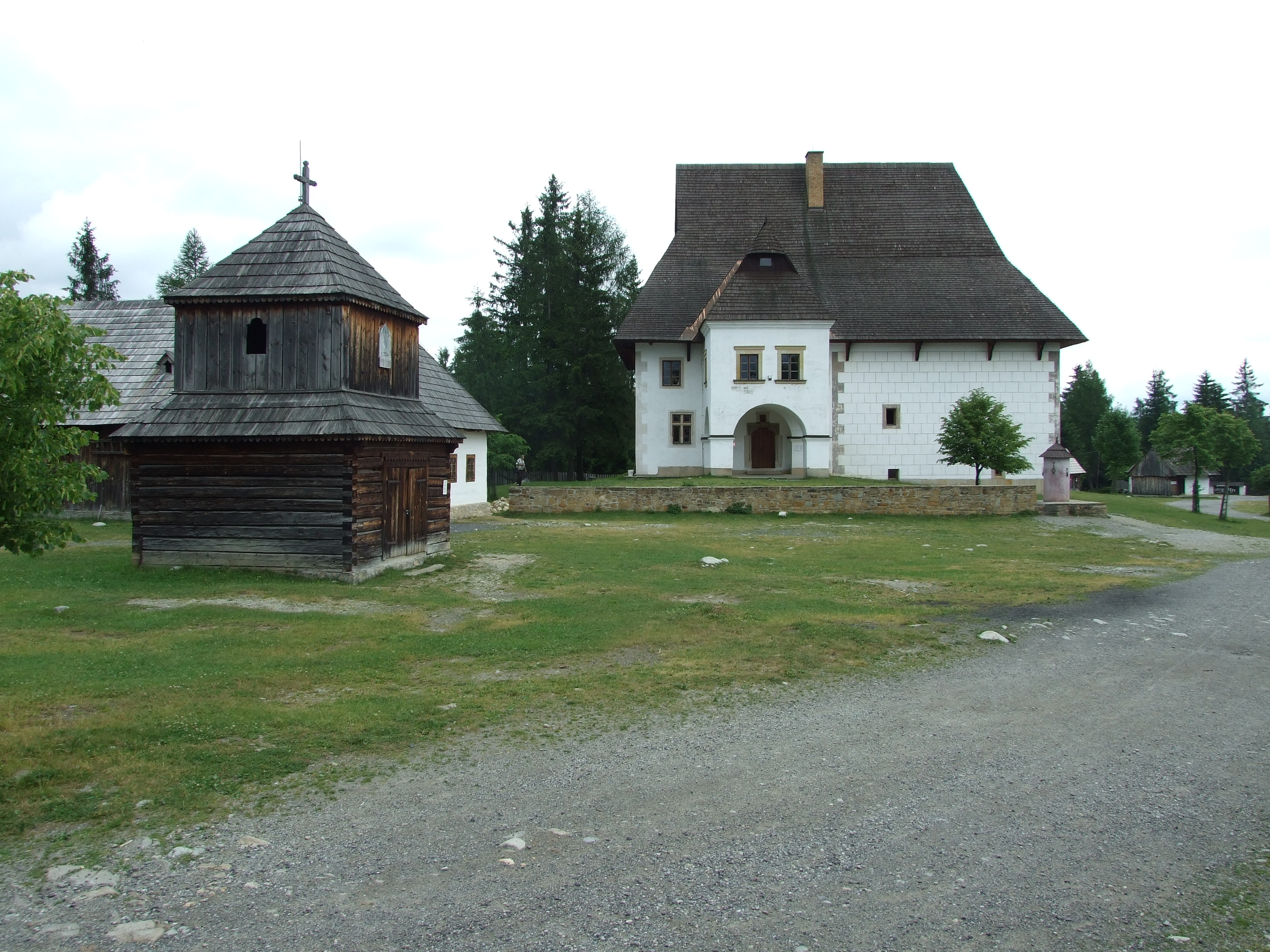 Múzeum liptovskej dediny v Pribyline sprístupnené verejnosti v roku 1991.